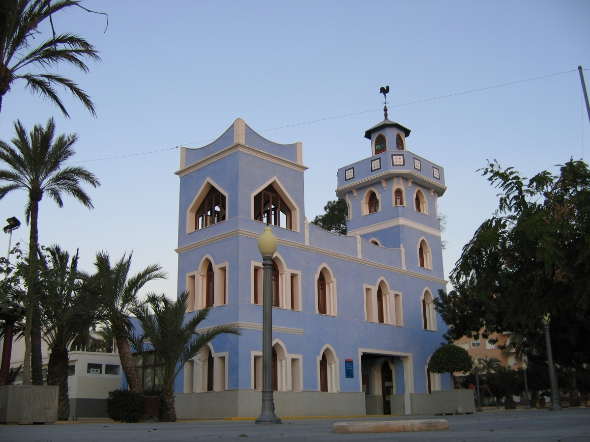 Edificio histórico Torre del Gall, en La Hoya de Elche.